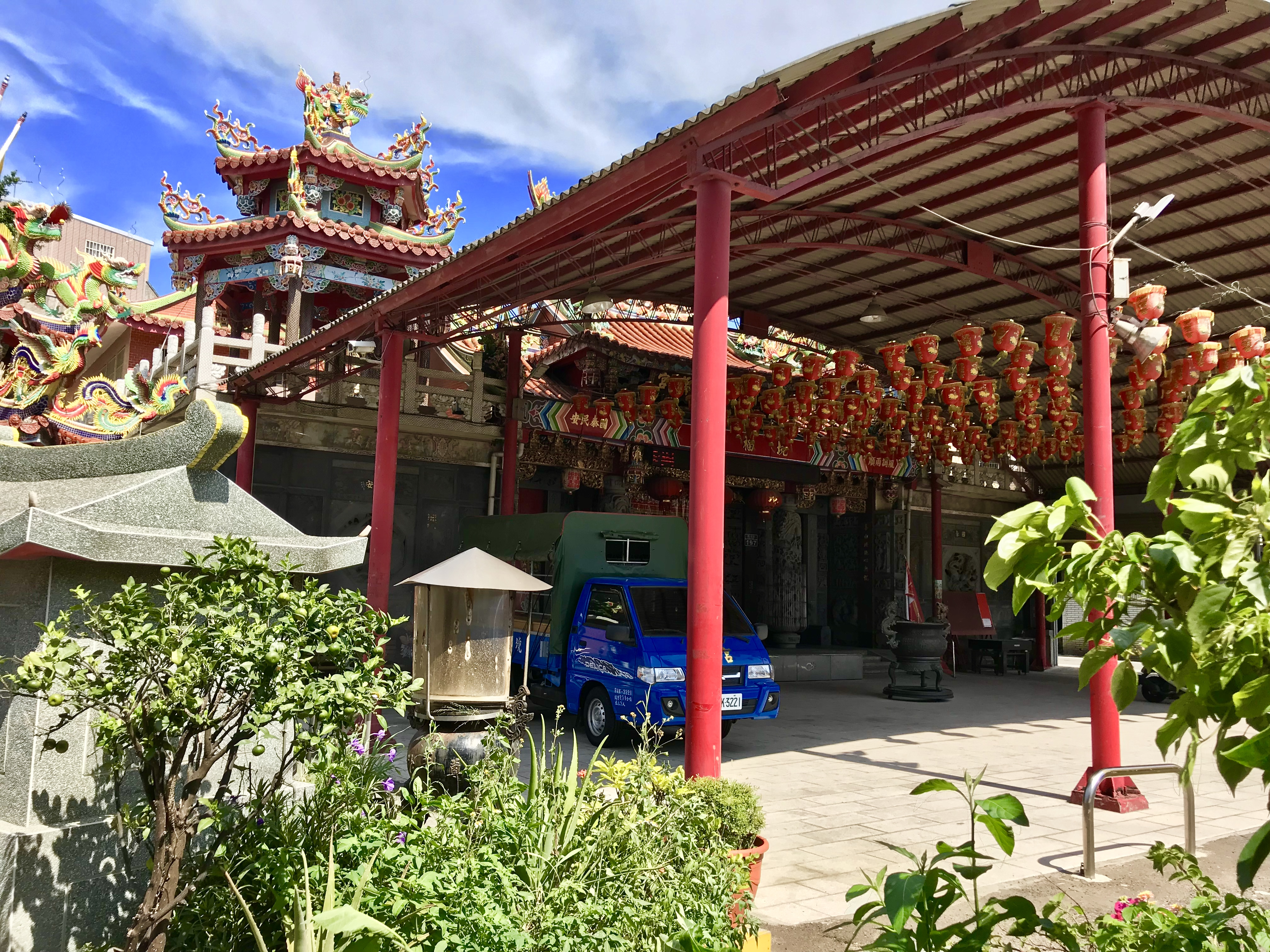 中文（台灣）: 樹林頭境福宮